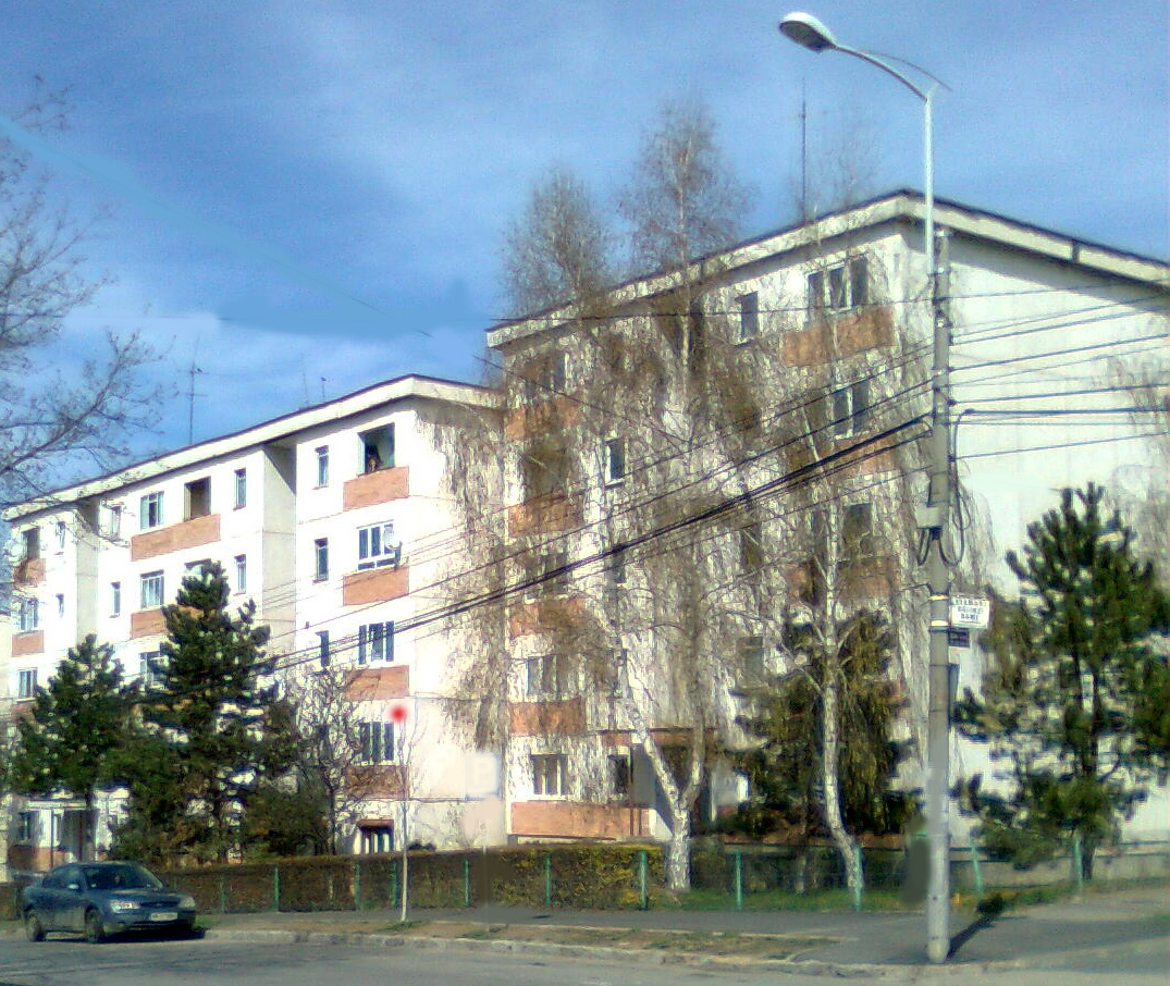 Bustya Endre Ady-kutató utolsó lakhelye Kolozsváron, Hajnal utca 35.